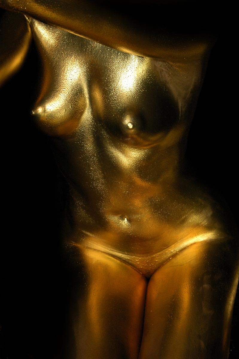 corps doré à la poudre d'or, photographie Pierre Joël